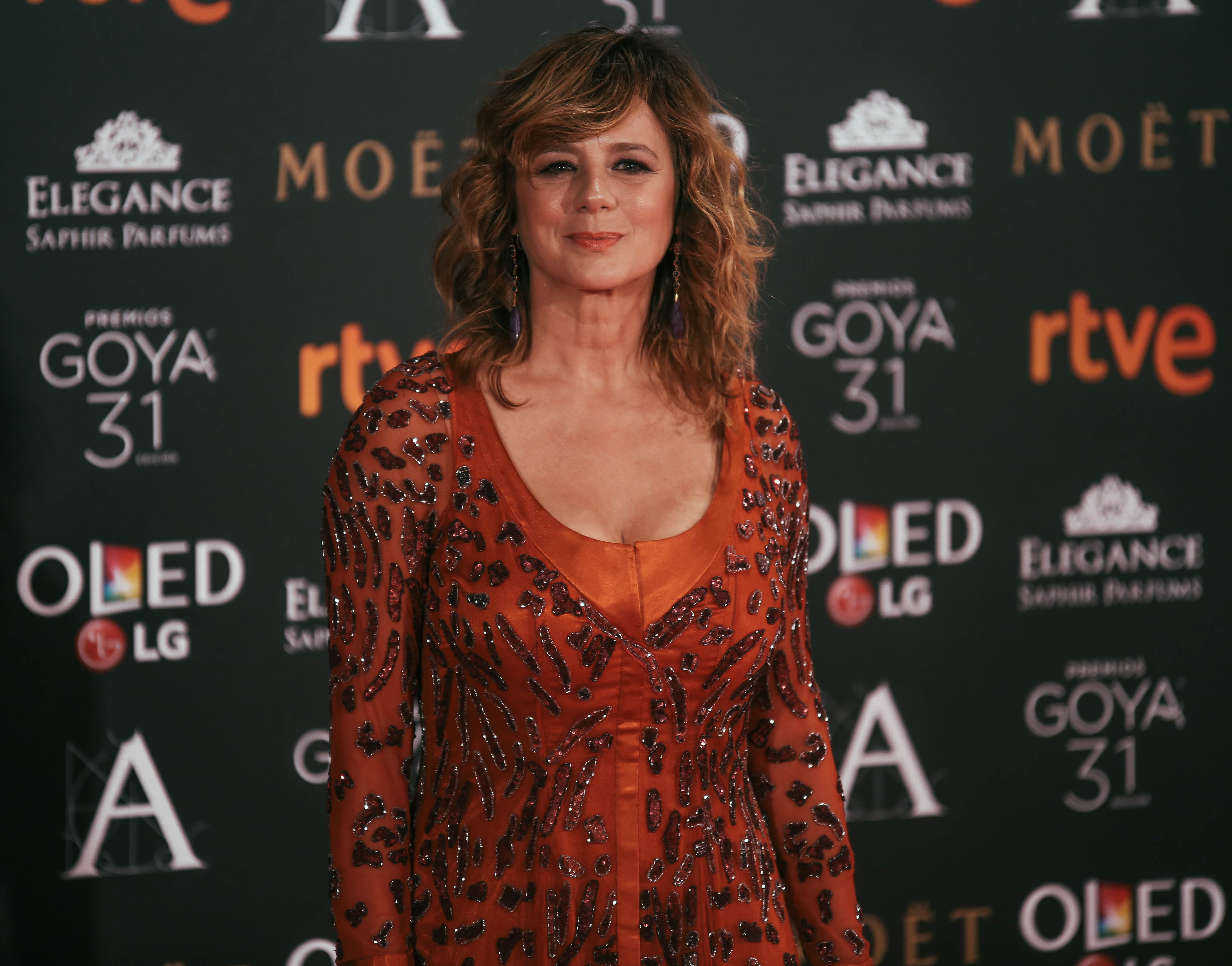 Emma Suárez en la alfombra roja de los Premios Goya 2017